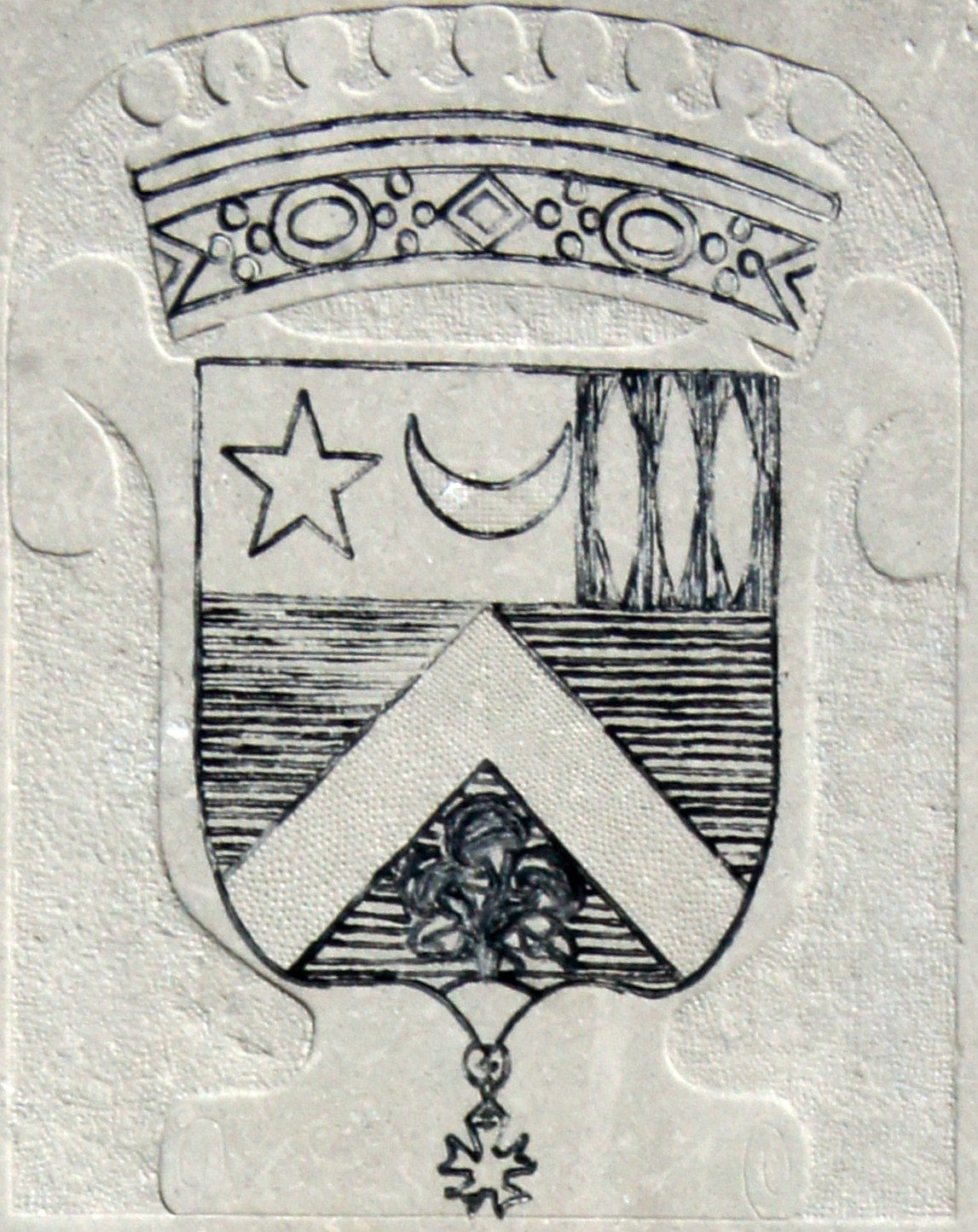 Blason de Poupart_baron_Neuflize 1784 1836, sur le gisant dans le cimetière du village .